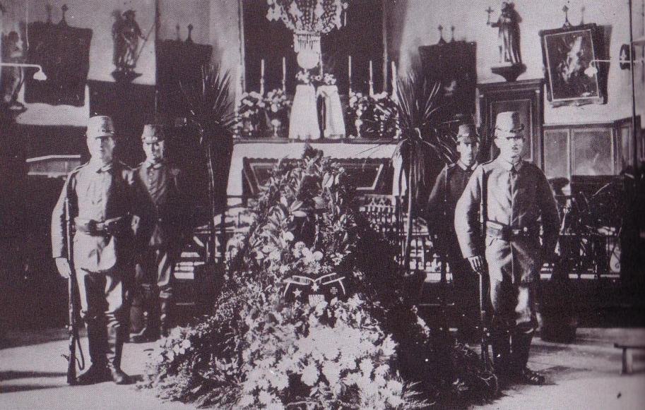 Die Aufbahrung von Buddeckes Sarg mit Blumenschmuck und Ehrenwache.